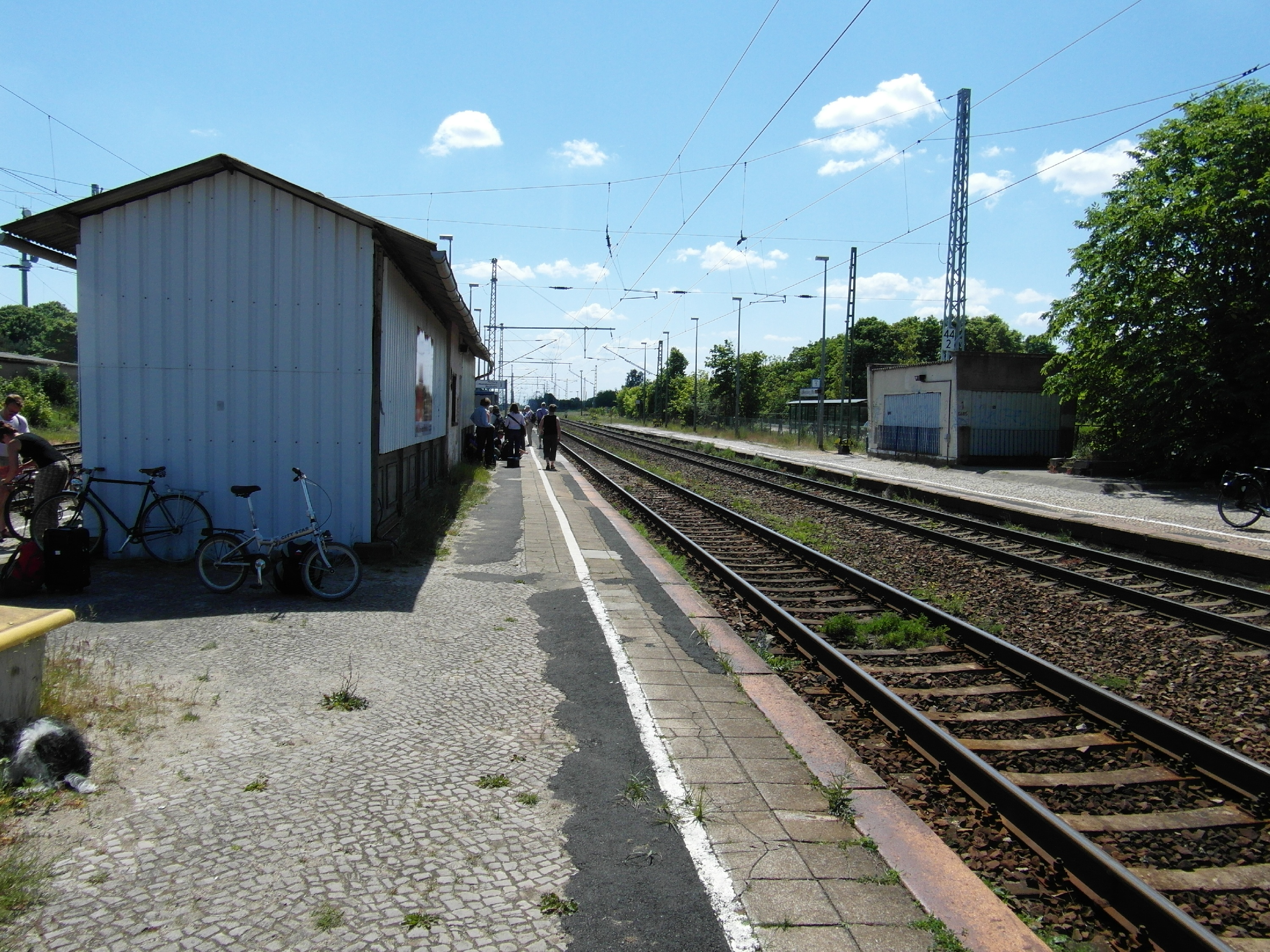 Löwenberg (Mark) - Bahnhof